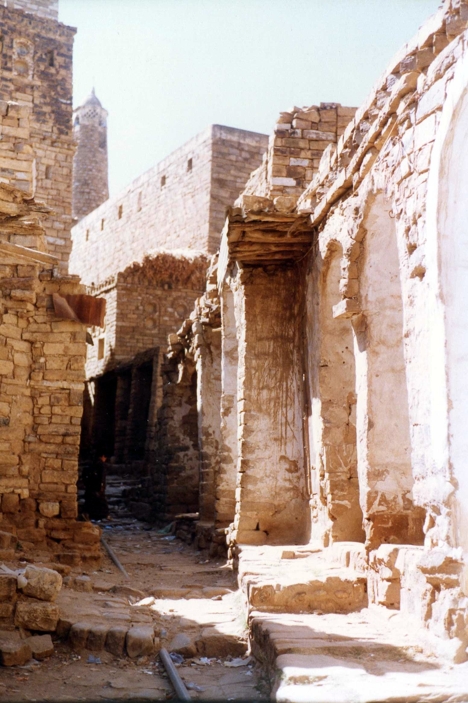 Thula